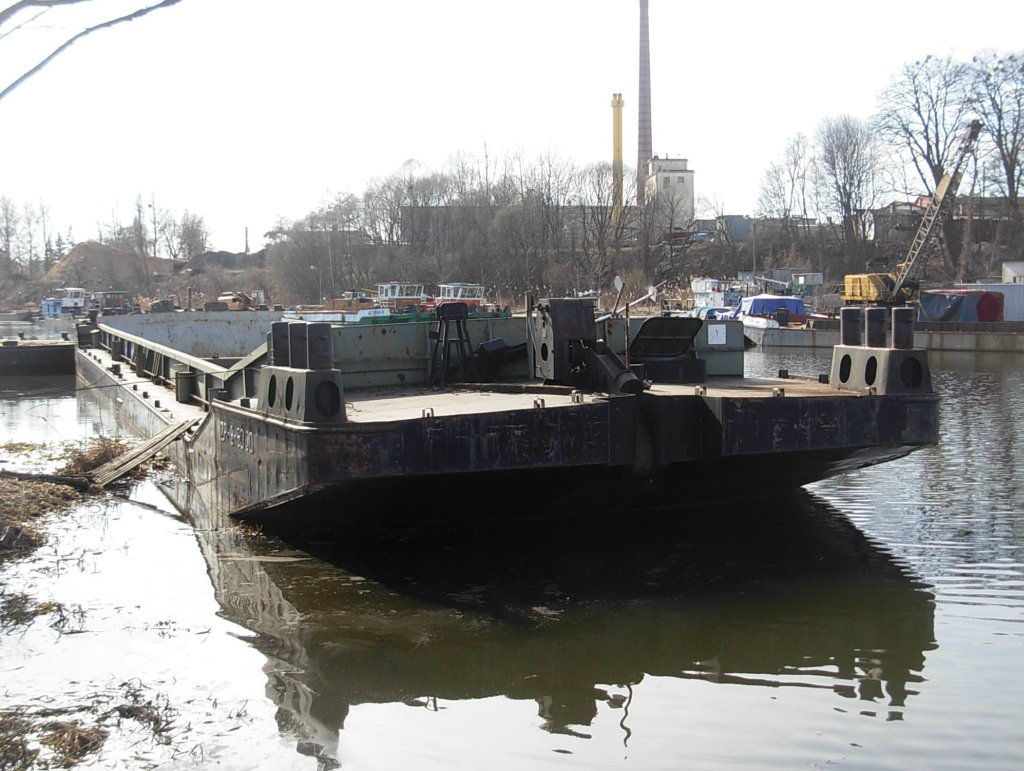 Port Żeglugi Bydgoskiej